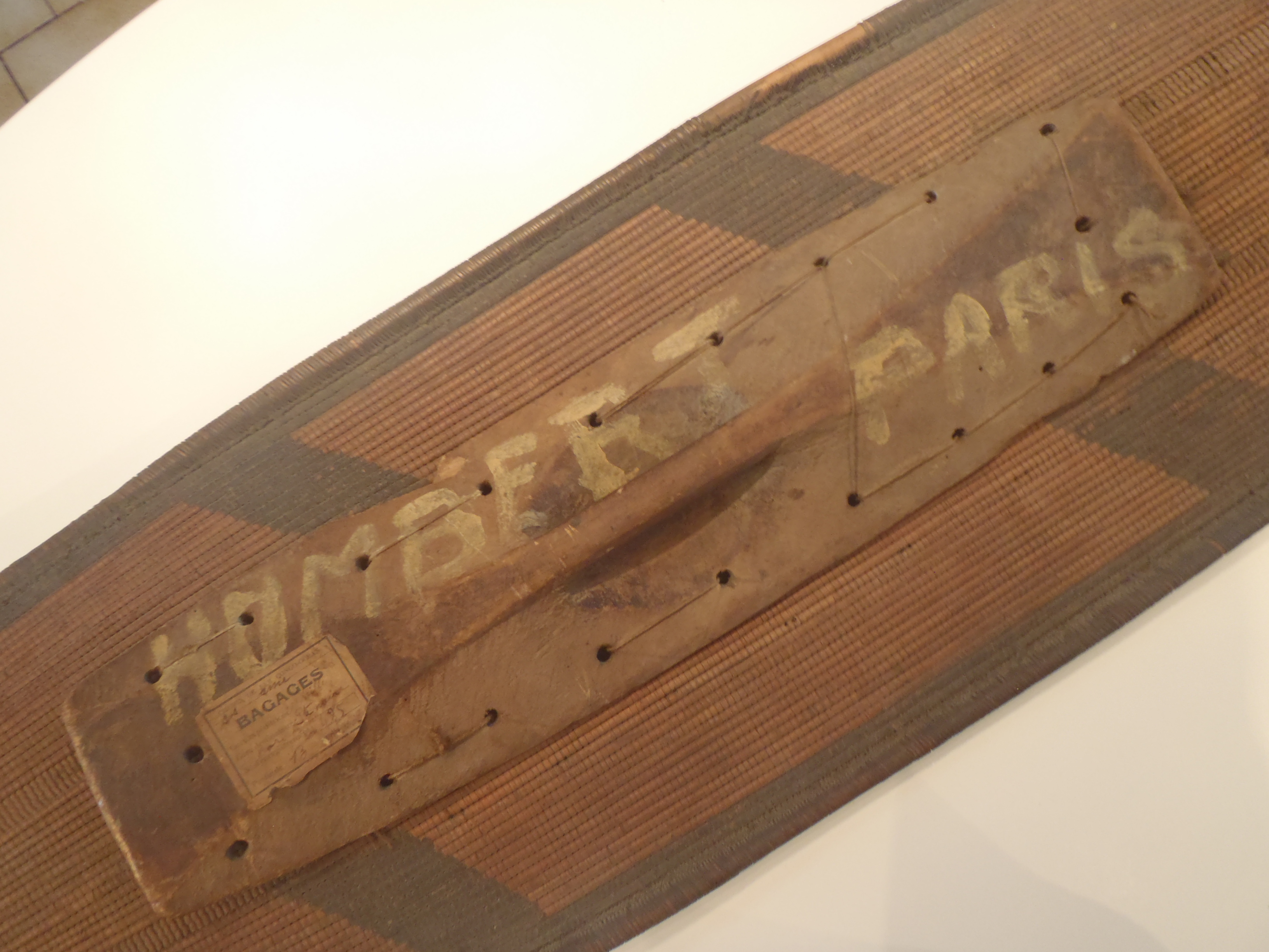 Vue de poignée de bouclier ( Congo ). Jean-Henri Humbert - circa 1930, Collection Philippe Pellering